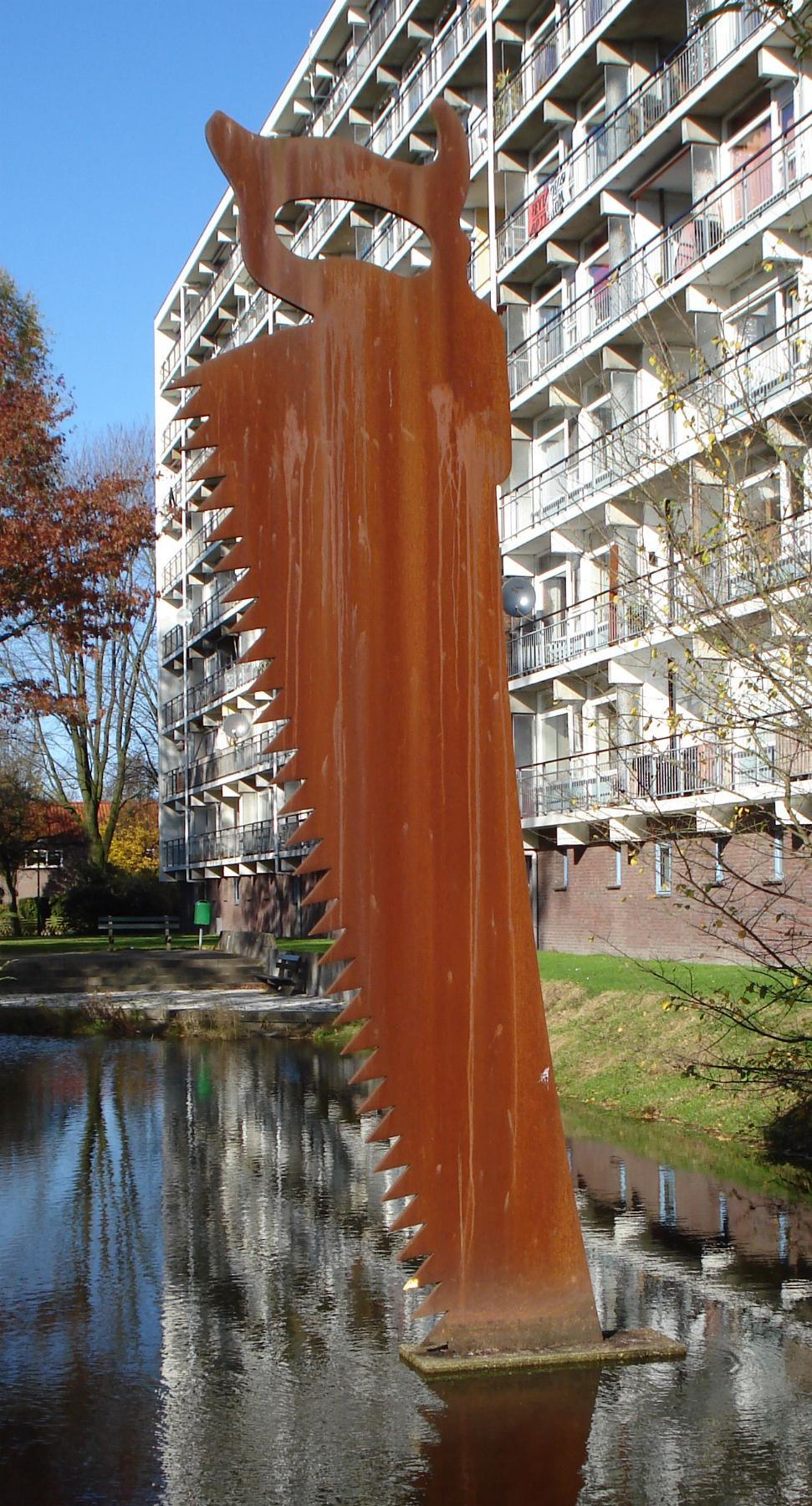 Soest, Dalweg/Koningsweg. Kunstwerk "IJzeren zaag" van Egbert de Rooy. Soest/The Netherlands. FOP.